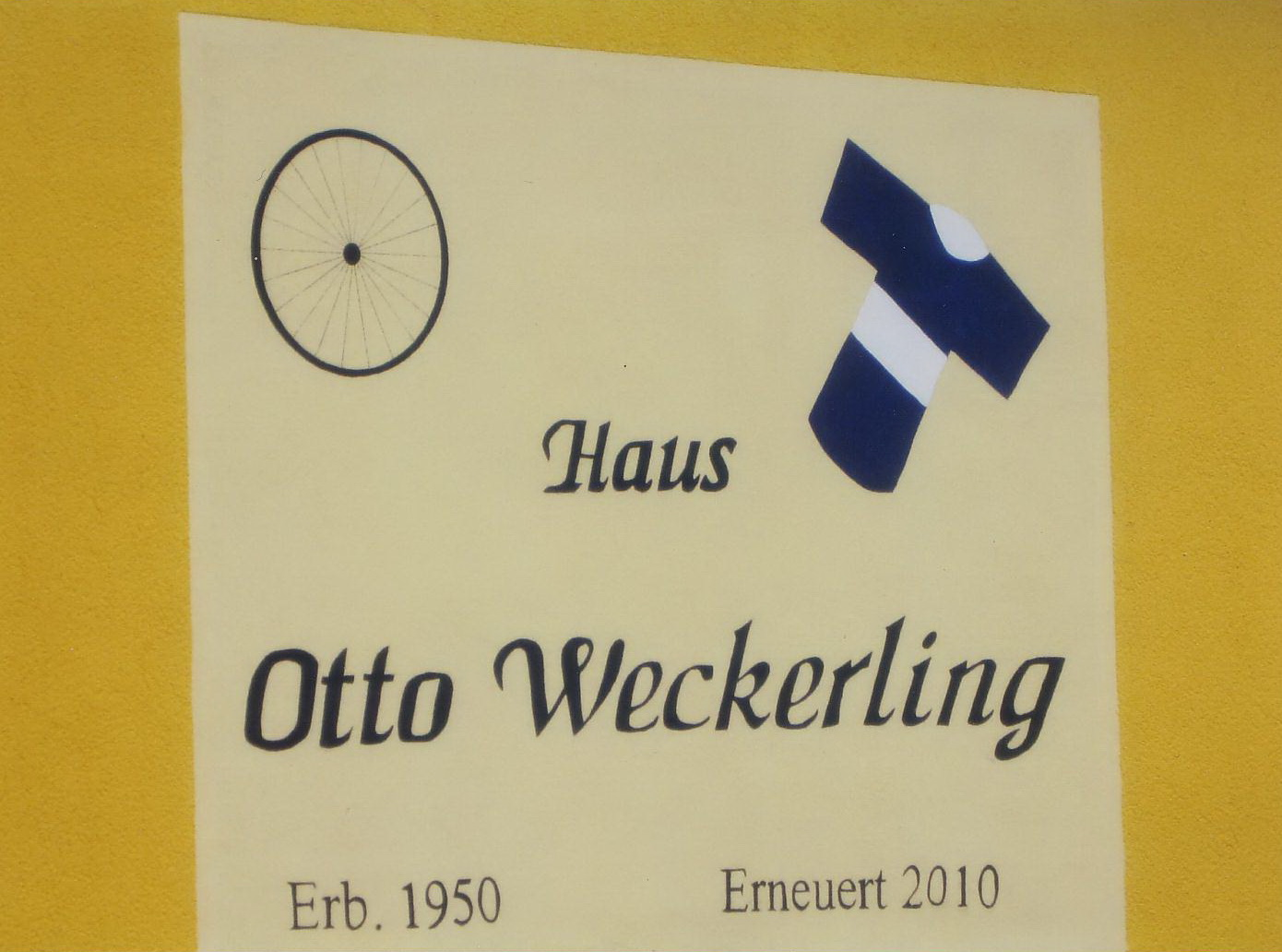 Tafel am ehemaligen Wohnhauses des Radrennfahrers Otto Weckerling in Kehnert